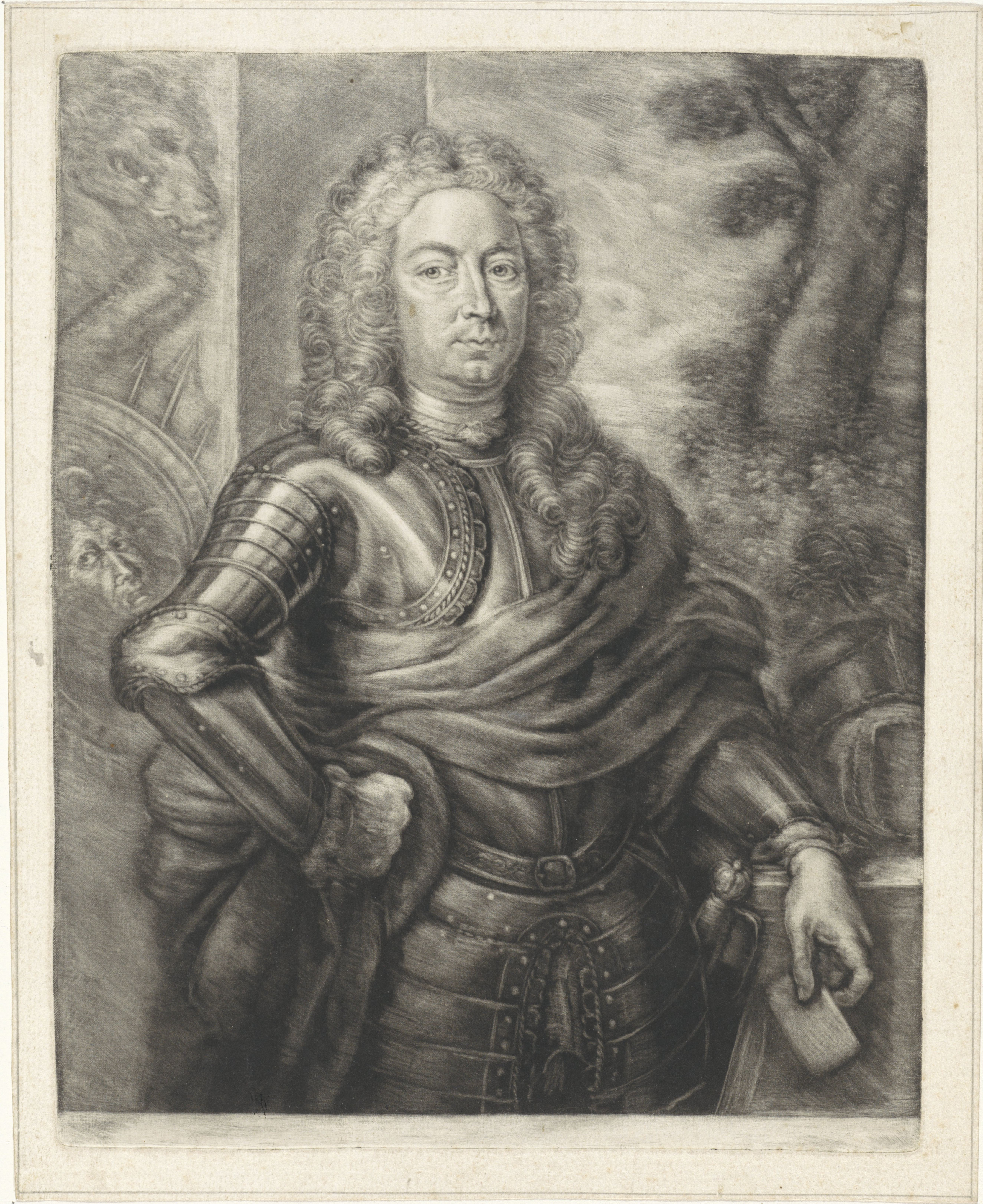 IdentificatieTitel(s): Portret van Johan Raye van BreukelerWaar: dObjecttype: prent Objectnummer: RP-P-1950-280Catalogusreferentie: Wurzbach 111(2)Opmerking: staat bepaald aan de hand van aanwezige prenten in RijksprentenkabinetOpschriften / Merken: verzamelaarsmerk, verso, gestempeld: Lugt 2228Omschrijving: Johan Raye van Breukelerwaard in harnas. Hij was van 1735 tot 1737 gouverneur-generaal van Suriname.VervaardigingVervaardiger: prentmaker: Johannes van VilsterenPlaats vervaardiging: Noordelijke NederlandenDatering: 1740Fysieke kenmerken: mezzotint; proefdrukMateriaal: papier Techniek: mezzotintAfmetingen: plaatrand: h 260 mm × b 205 mmOnderwerpWat: armourWie: Johan Raye van BreukelerwaardVerwerving en rechtenVerwerving: aankoop 1950Copyright: Publiek domein